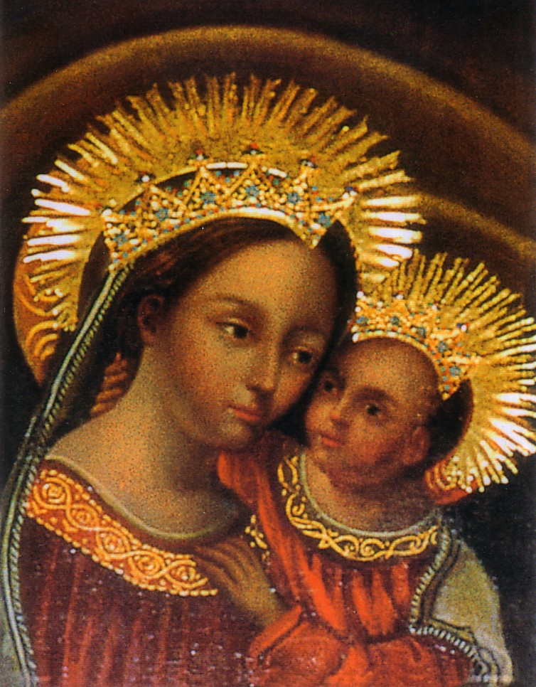 Gnadenbild in der Blumenthaler Kirche zu Preßburg, heute Bratislava